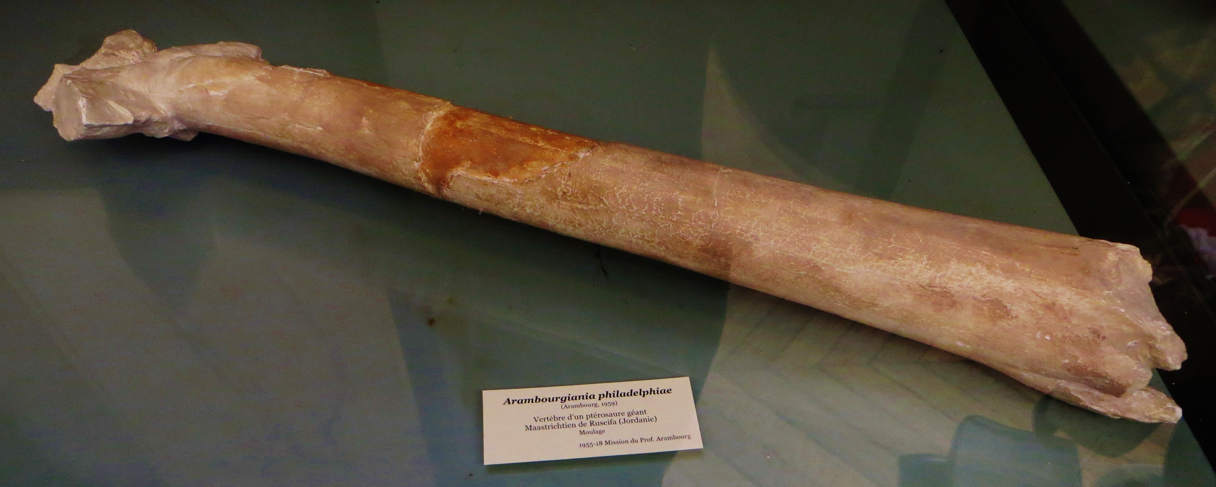 Fossil of Arambourgiania, an extinct reptile- Took the photo at Museum Histoire Naturelle, Paris